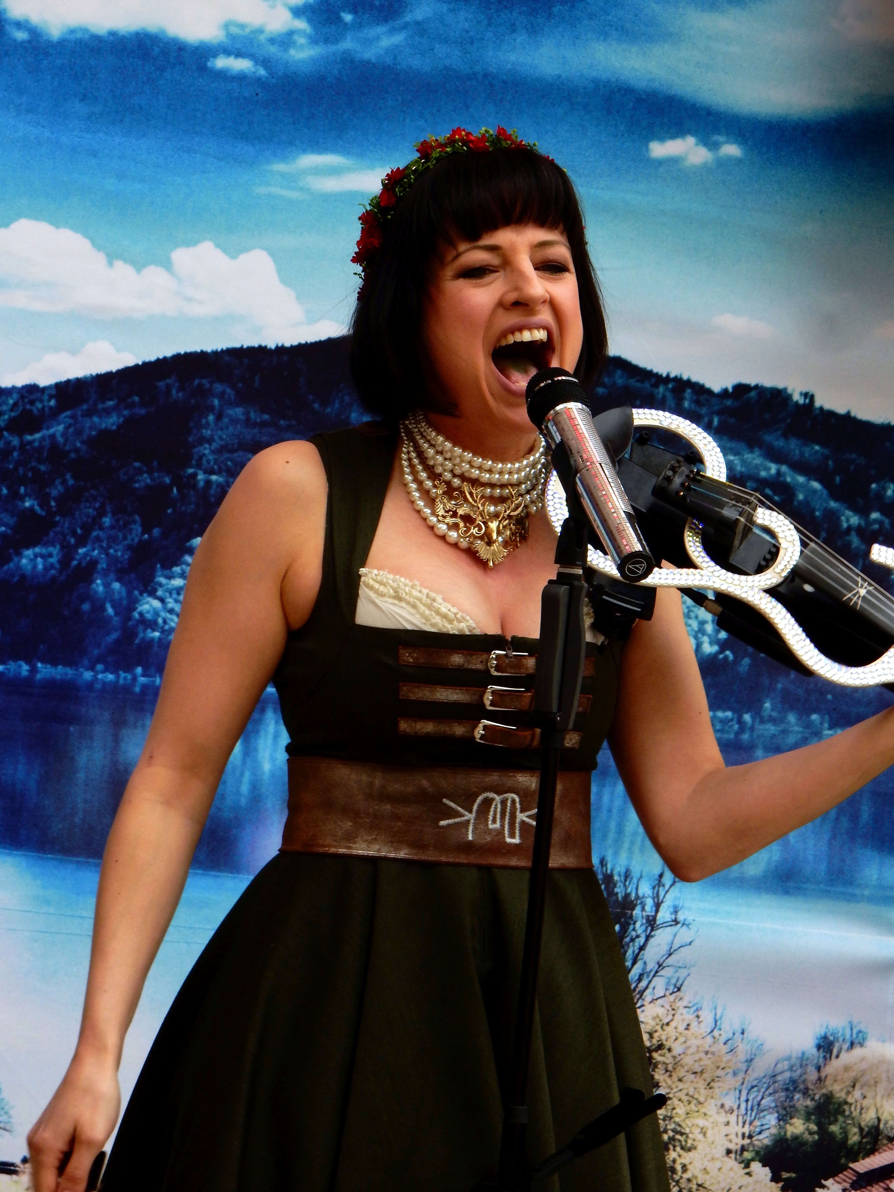 Marlen Billii live in der Weberzeile (Ried im Innkreis)